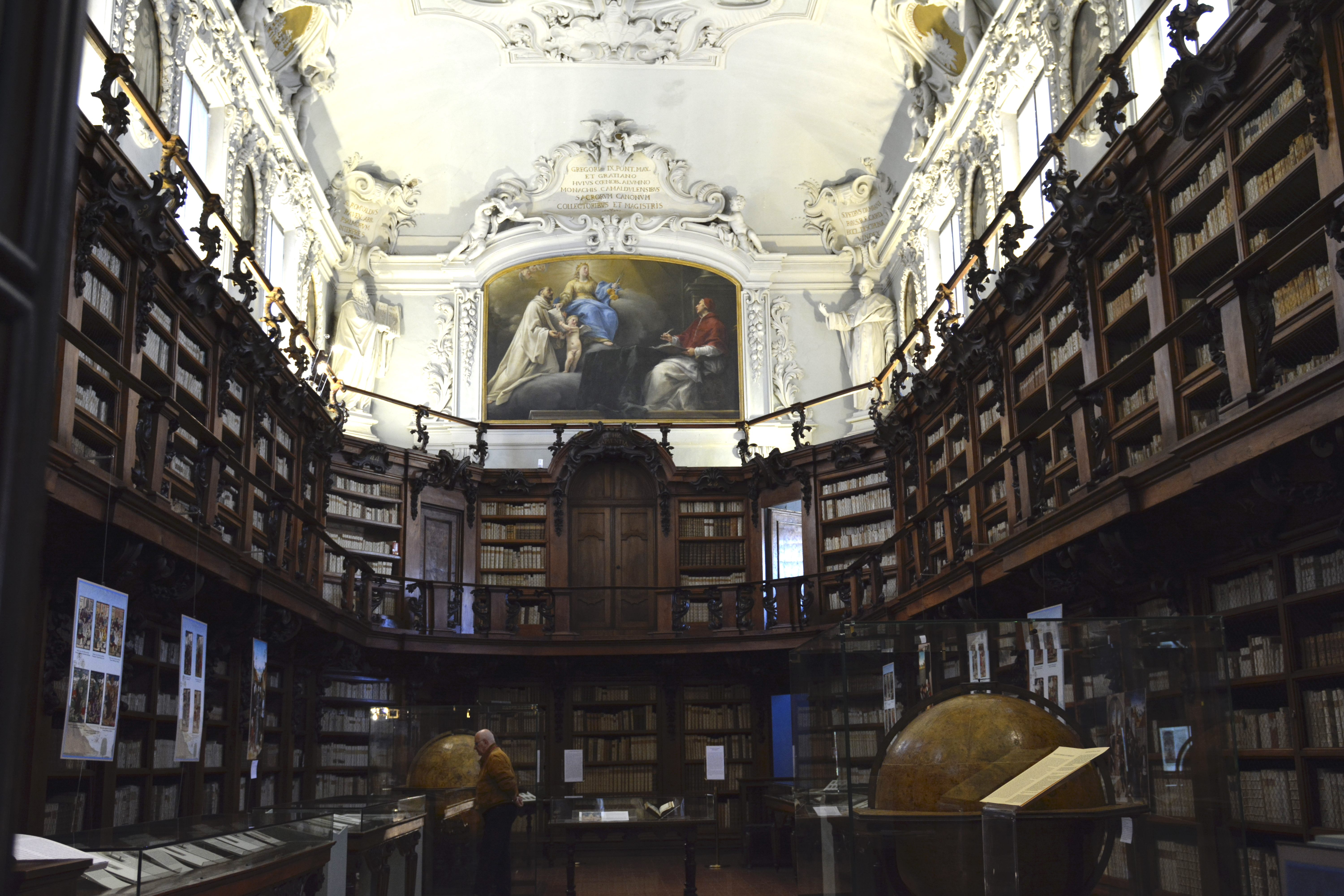 Istituzione Biblioteca Classense This is a photo of a monument which is part of cultural heritage of Italy.